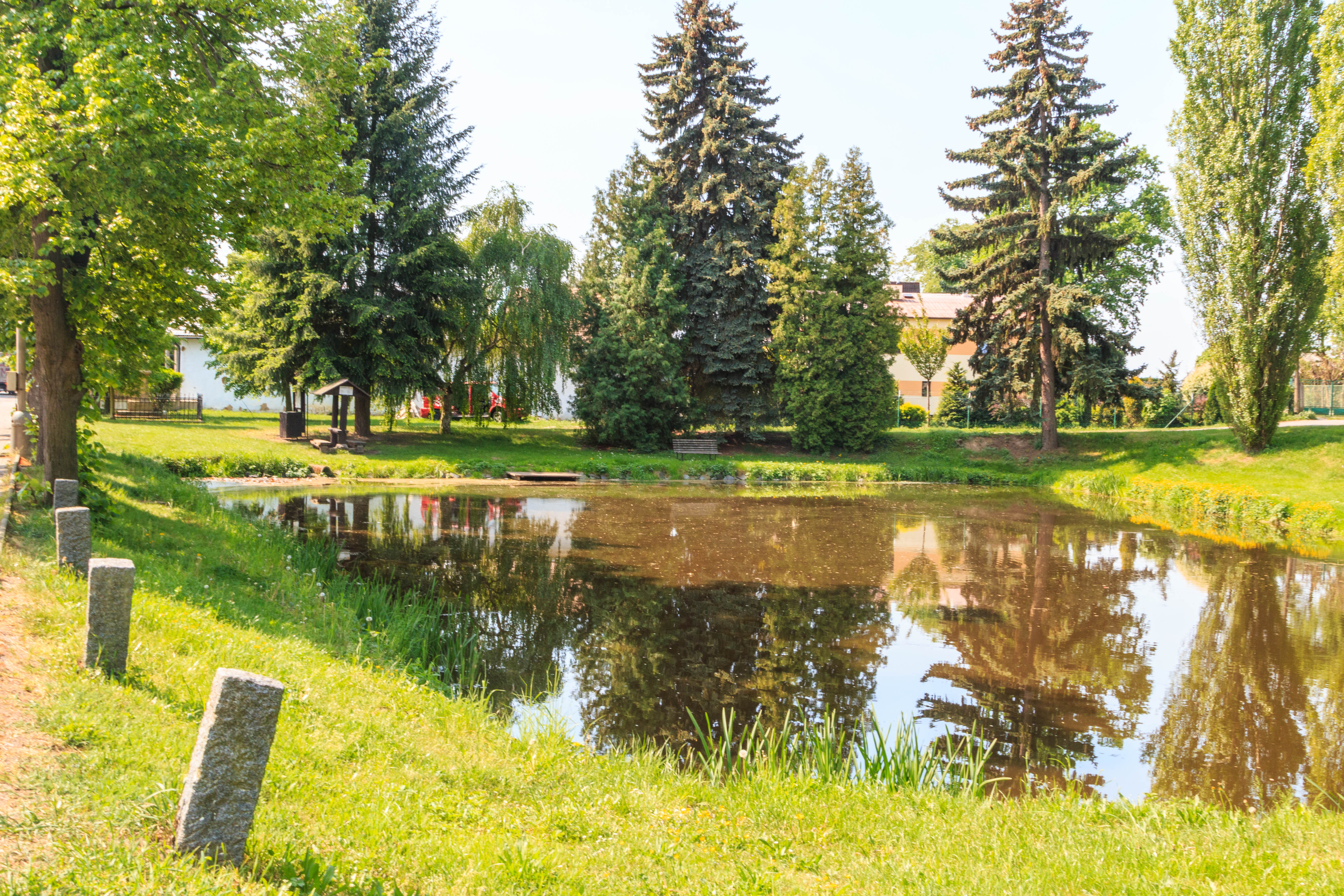 Návesní rybník v Kostěnicích Project: Vodstvo